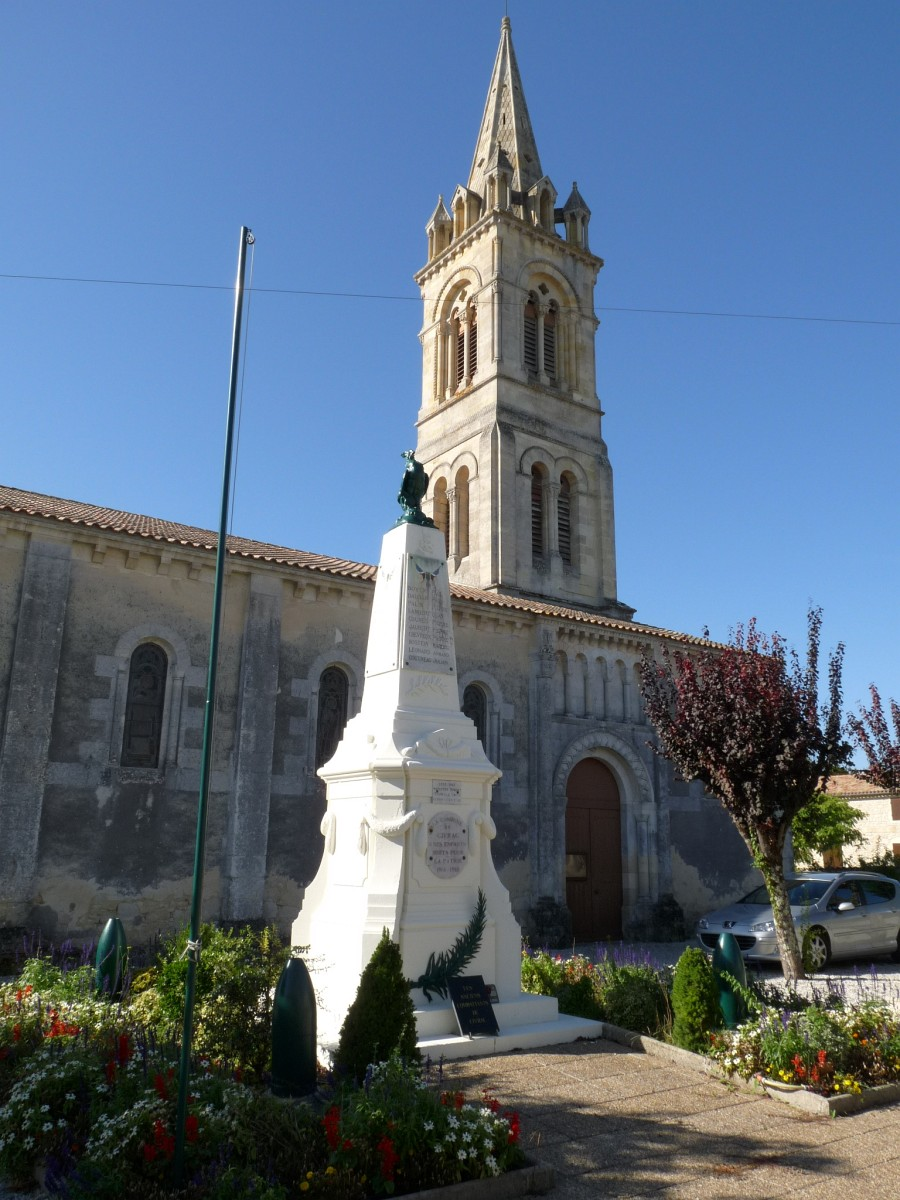 Monument aux morts et église de Civrac-en-Médoc, Gironde, France